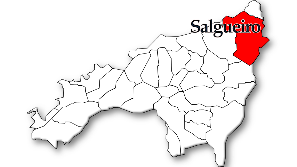 População